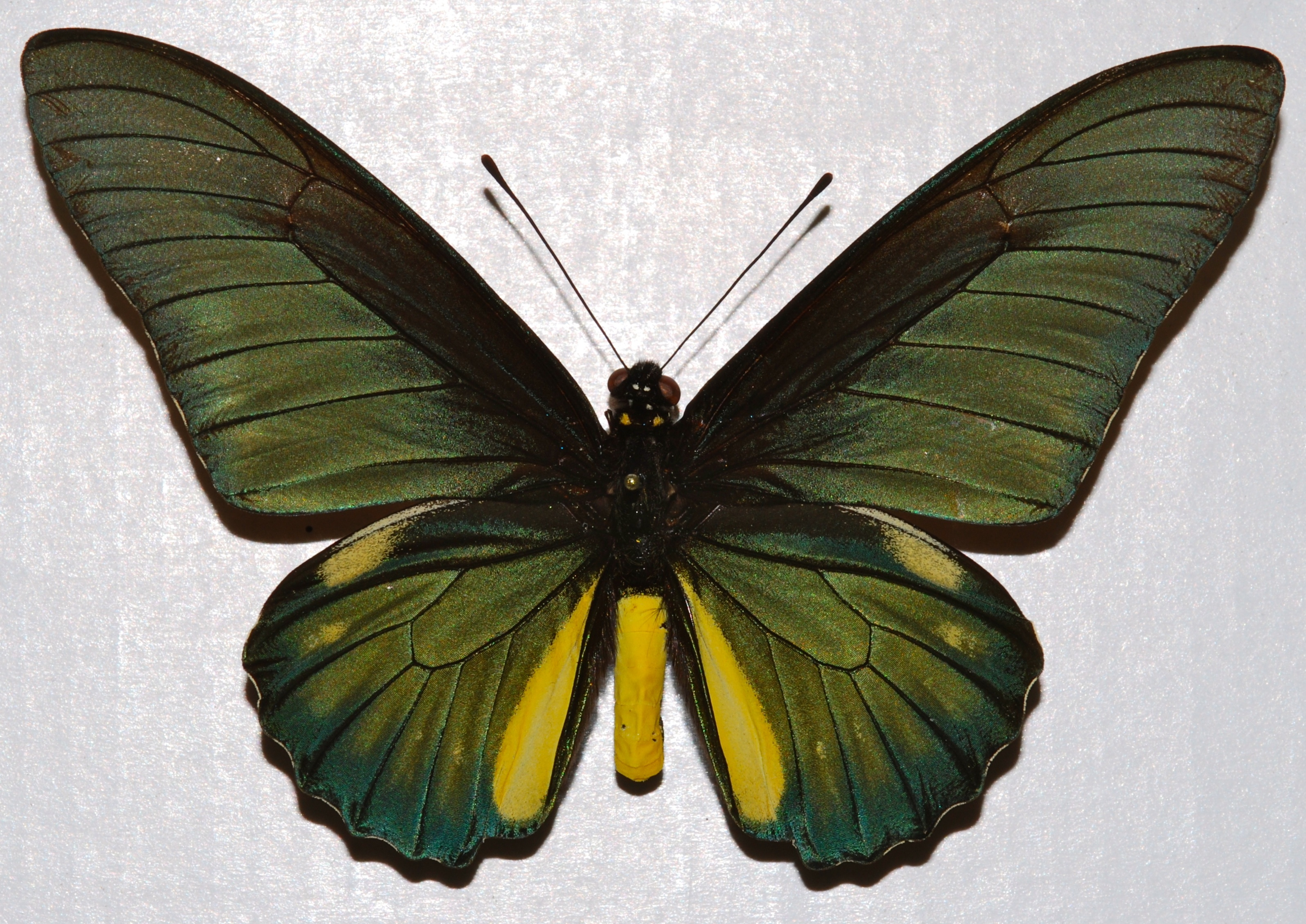 Tingo Maria, PERU